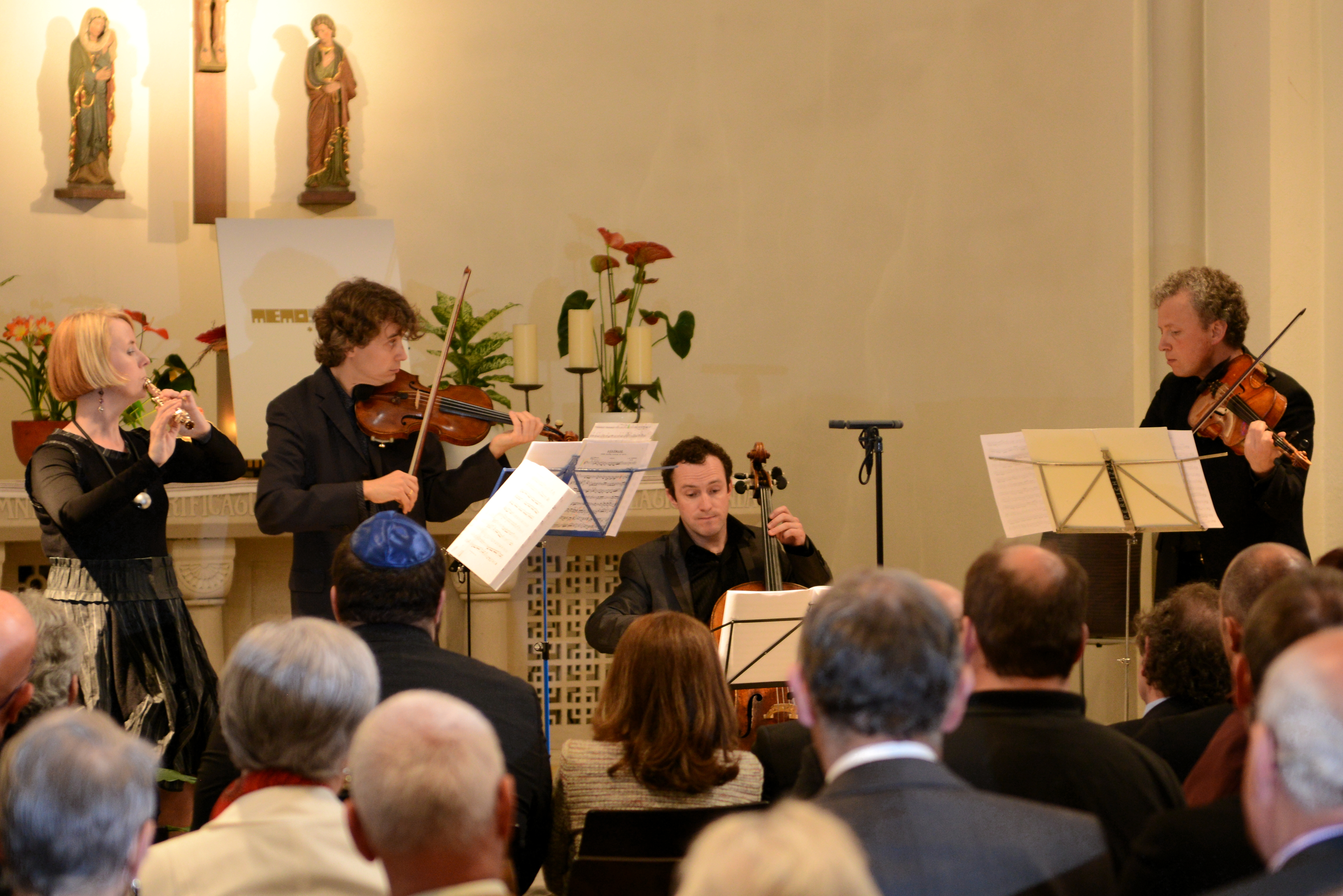 D'Flüttistin Anne Börgmann spillt zesumme mam Trio Louvigny. Am Kader vum Klenge Maarnicher Festival hat d'Associatioun MemoShoah Lëtzebuerg de 27. Abrëll 2014 op e Concert de bienfaisance an de d'Klouschter op der Pafemillen zu Cinqfontaines agelueden. Den Evenement stoung ënner dem Patronage vun der Wëntger Gemeng an Zesummenaarbecht mam Cube 521. De Concert an der Klouschterkapell gouf vum Trio Louvigny zesumme mat der Anne Börgmann gespillt. Den Erléis vun der Manifestatioun war fir de Projet vu MemoShoah op dësem Site e «Centre de rencontre et de mémoire de la Shoah» anzeriichten. D'Klouschter, 1903 vun den Häerz-Jesu Patere gegrënnt, gouf am Zweete Weltkrich vun den Nazien als Internéierunglager fir jiddesch Matbierger benotzt. An der Zäit vun 1941 bis 1943 goufen hei ënner onmënschleche Konditiounen eng knapp 300 Leit duerchgeschleist, ier se a Vernichtungslager an Osteuropa ëmbruecht goufen.